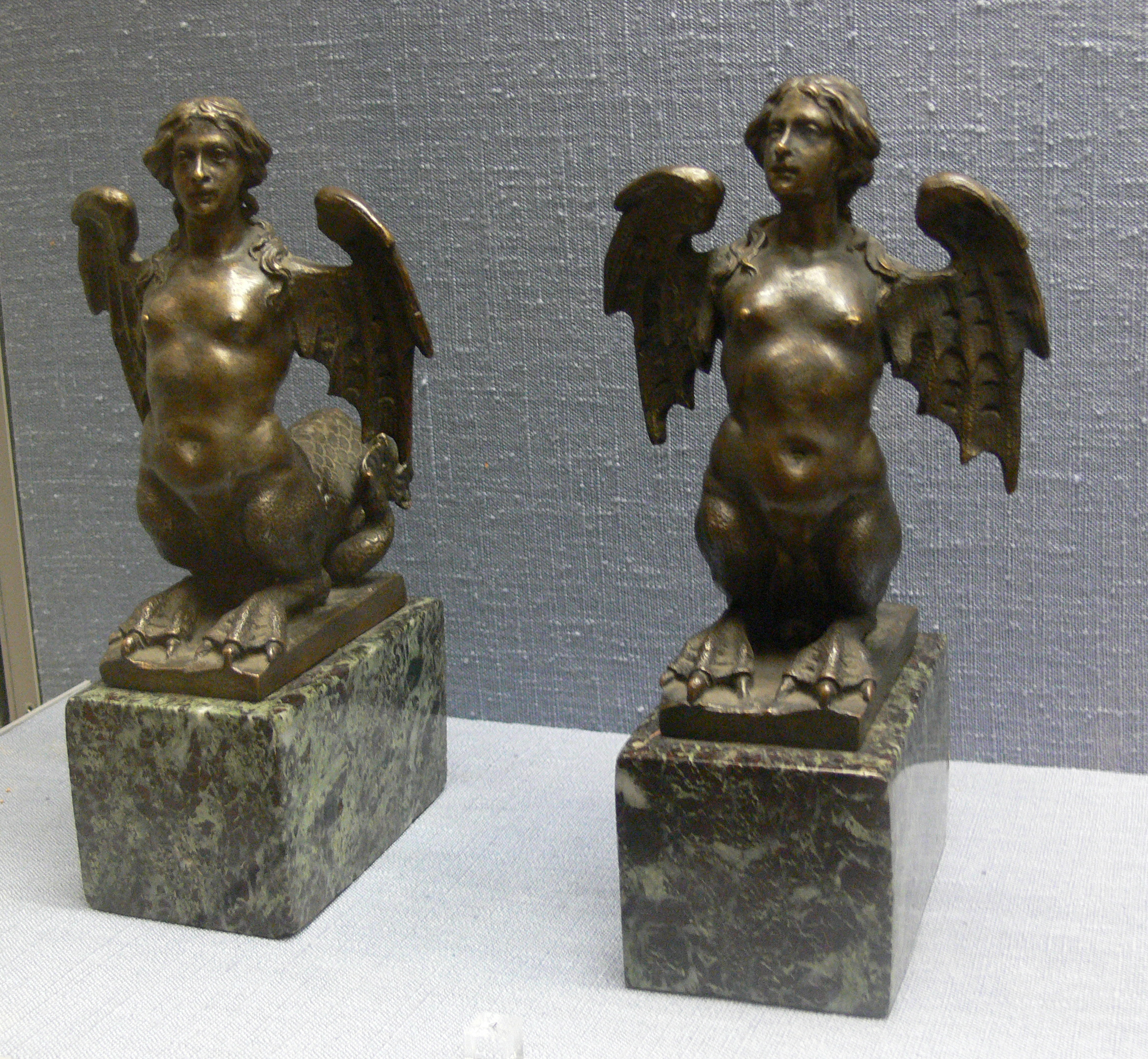 zwei Buchstützten in Gestalt von Sirenen (Verderben bringende Seedämonen); Bronze gegossen auf Marmorsockel, Italien, Ende 16./Anfang 17. Jh. Kunstgewerbemuseum Berlin, Inv. Nr. 1890,231 und 1890,232